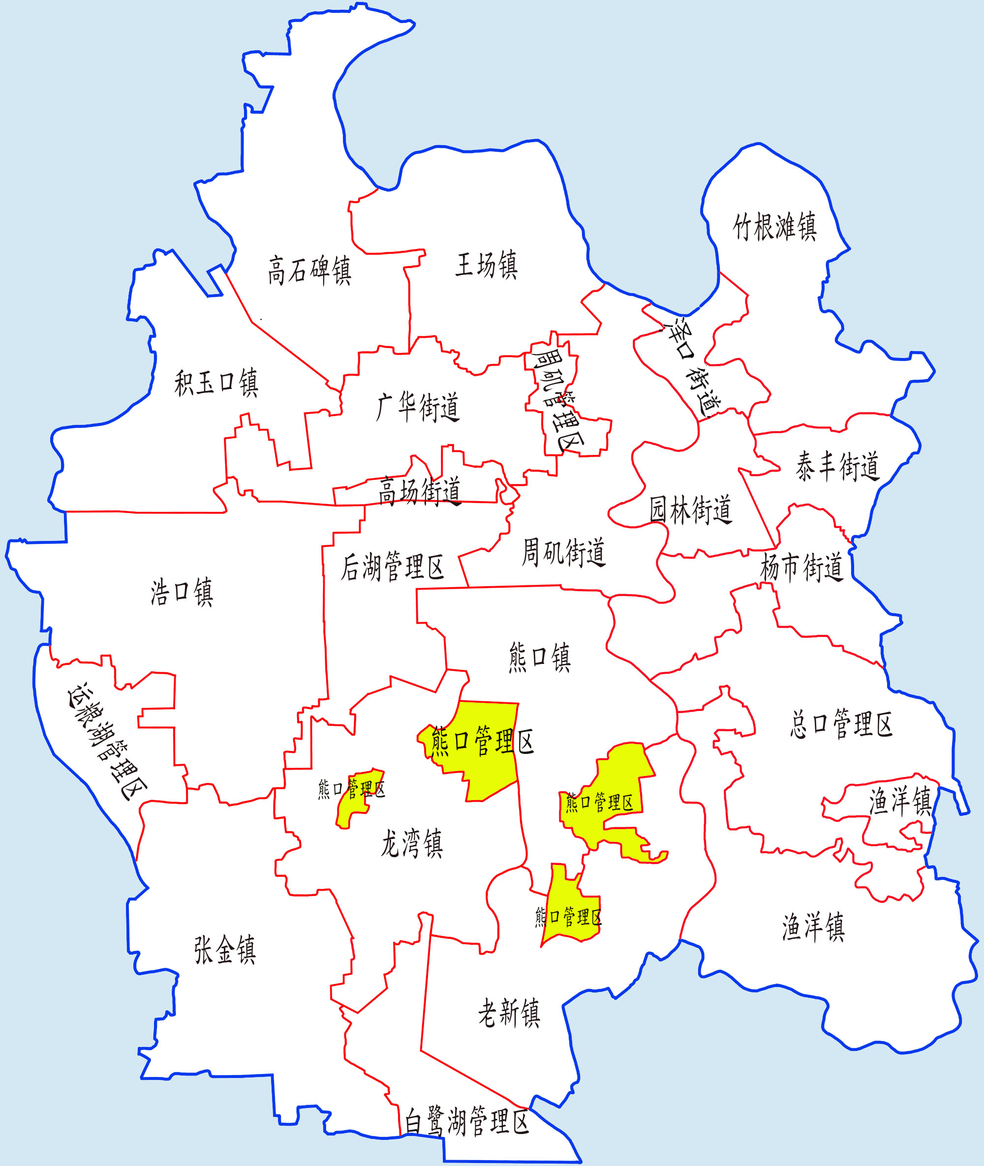 첸장시 행정구역